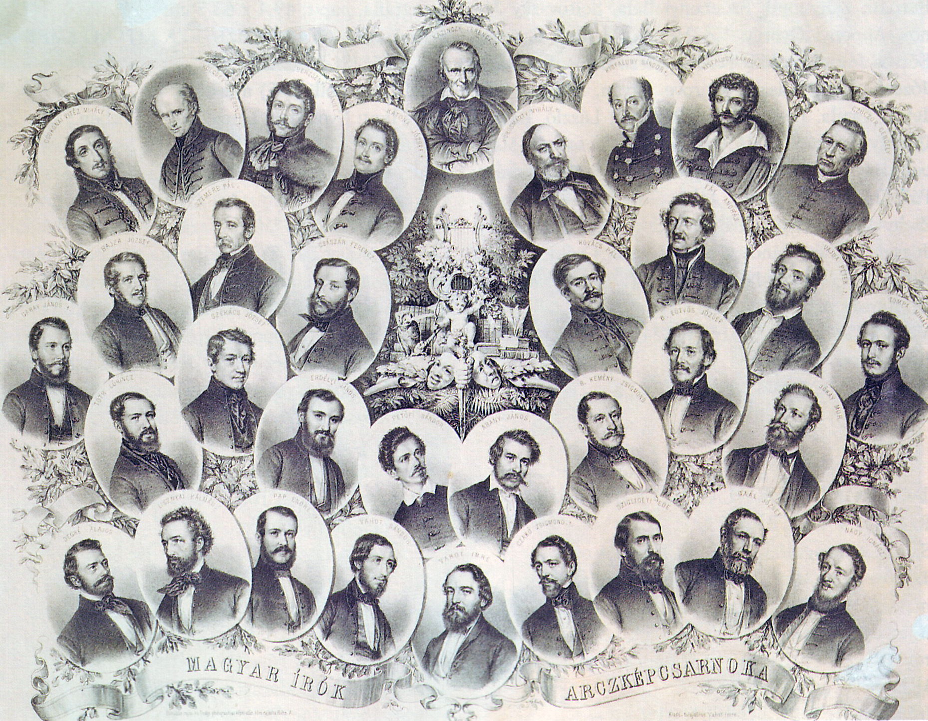 Az ábrázolt személyek: felső sor: Csokonai Vitéz Mihály, Kölcsey Ferenc, Berzsenyi Dániel, Katona József, Kazinczy Ferenc, Vörösmarty Mihály, Kisfaludy Sándor, Kisfaludy Károly, Czuczor Gergely második sor: Garay János, Bajza József, Szemere Pál, Császár Ferenc, Kovács Pál, Fáy András, Vajda Péter, Tompa Mihály harmadik sor: Tóth Lőrinc, Székács József, Erdélyi János, Petőfi Sándor, Arany János, Kemény Zsigmond, Eötvös József, Jókai Mór negyedik sor: Degré Alajos, Lisznyai Kálmán, Pap Endre, Vahot Sándor, Vahot Imre, Czakó Zsigmond, Szigligeti Ede, Gaál József, Nagy Ignác